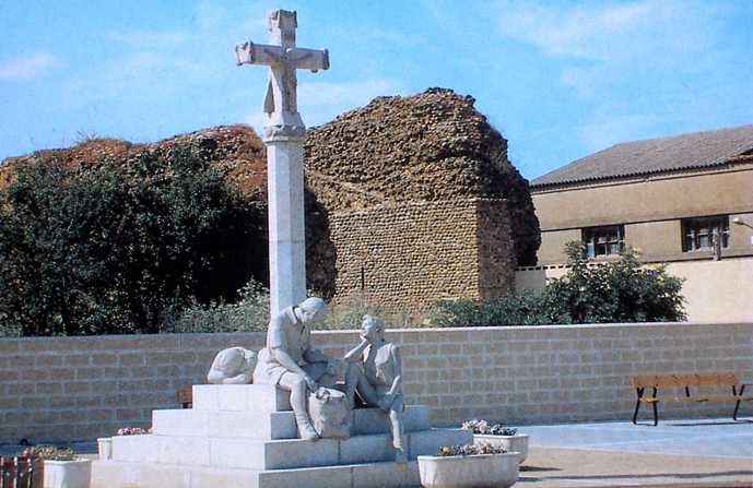 Monumento al Peregrino sito en Mansilla de las Mulas, en plena ruta del Camino de Santiago.